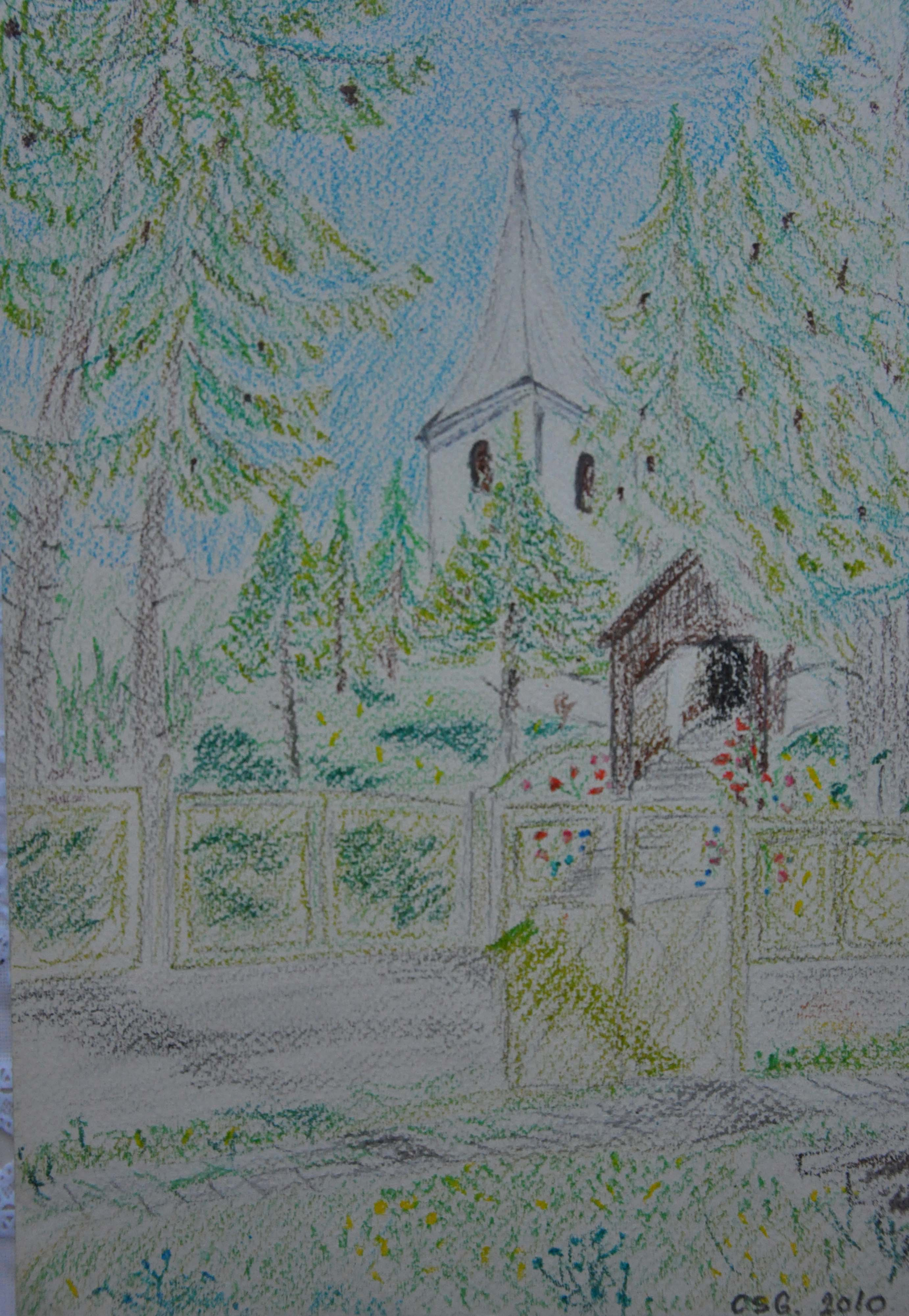 Magyarkirályfalvi református torony rajza